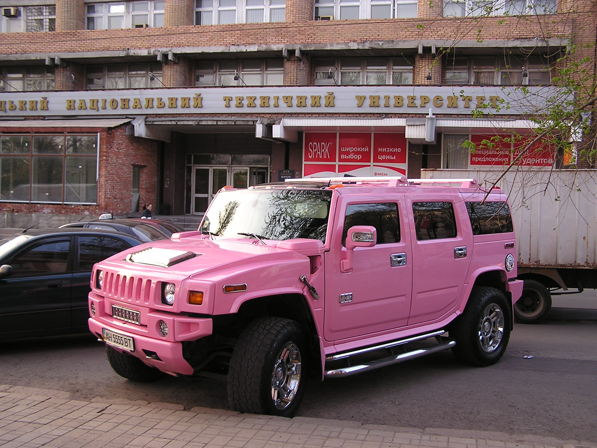 Автомобиль в Донецке